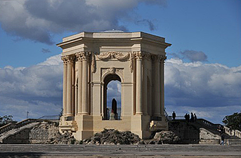 Chateau d'eau du Peyrou à Montpellier